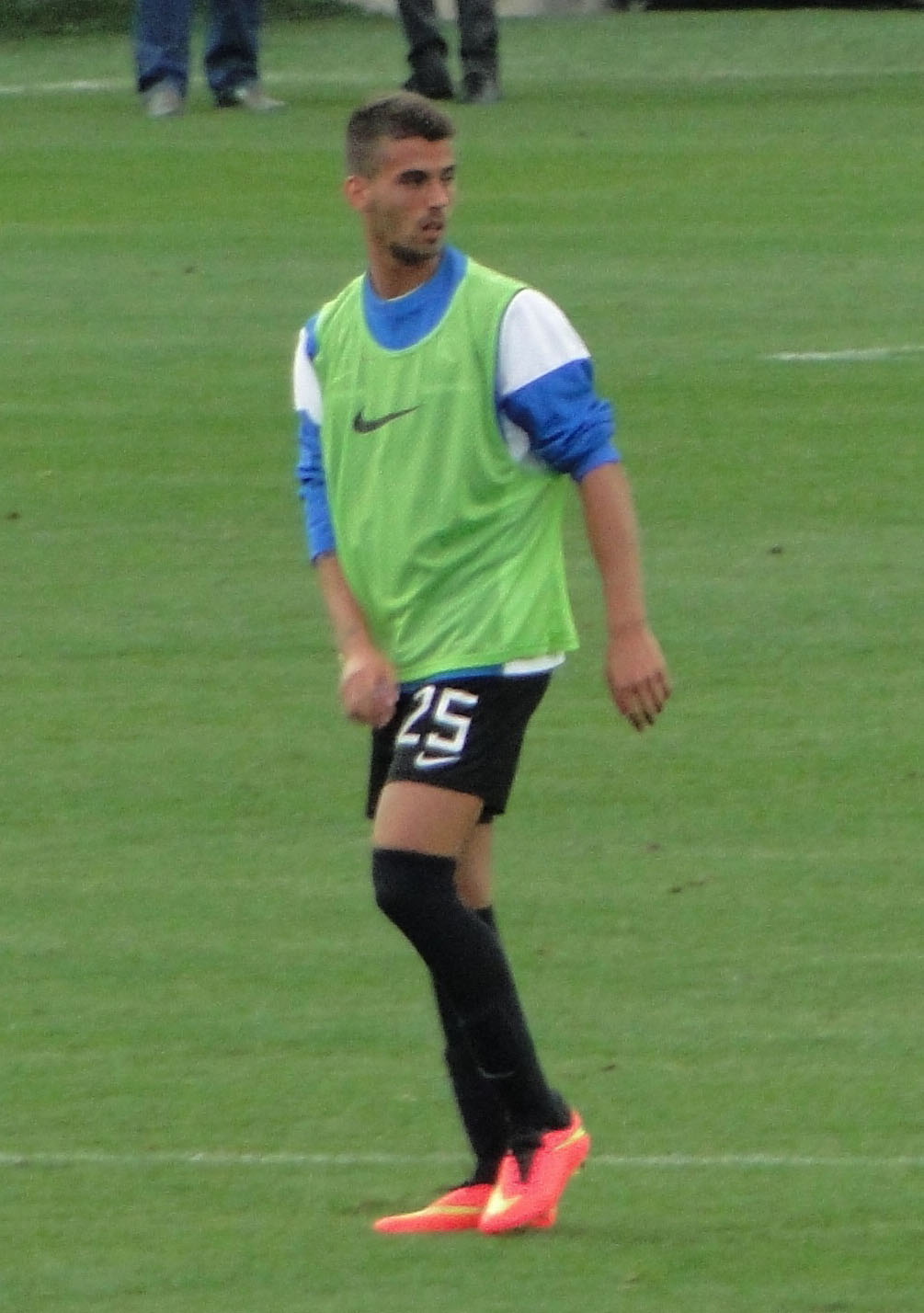 Leonardo Spinazzola, calciatore italiano, con la maglia dell'Atalanta